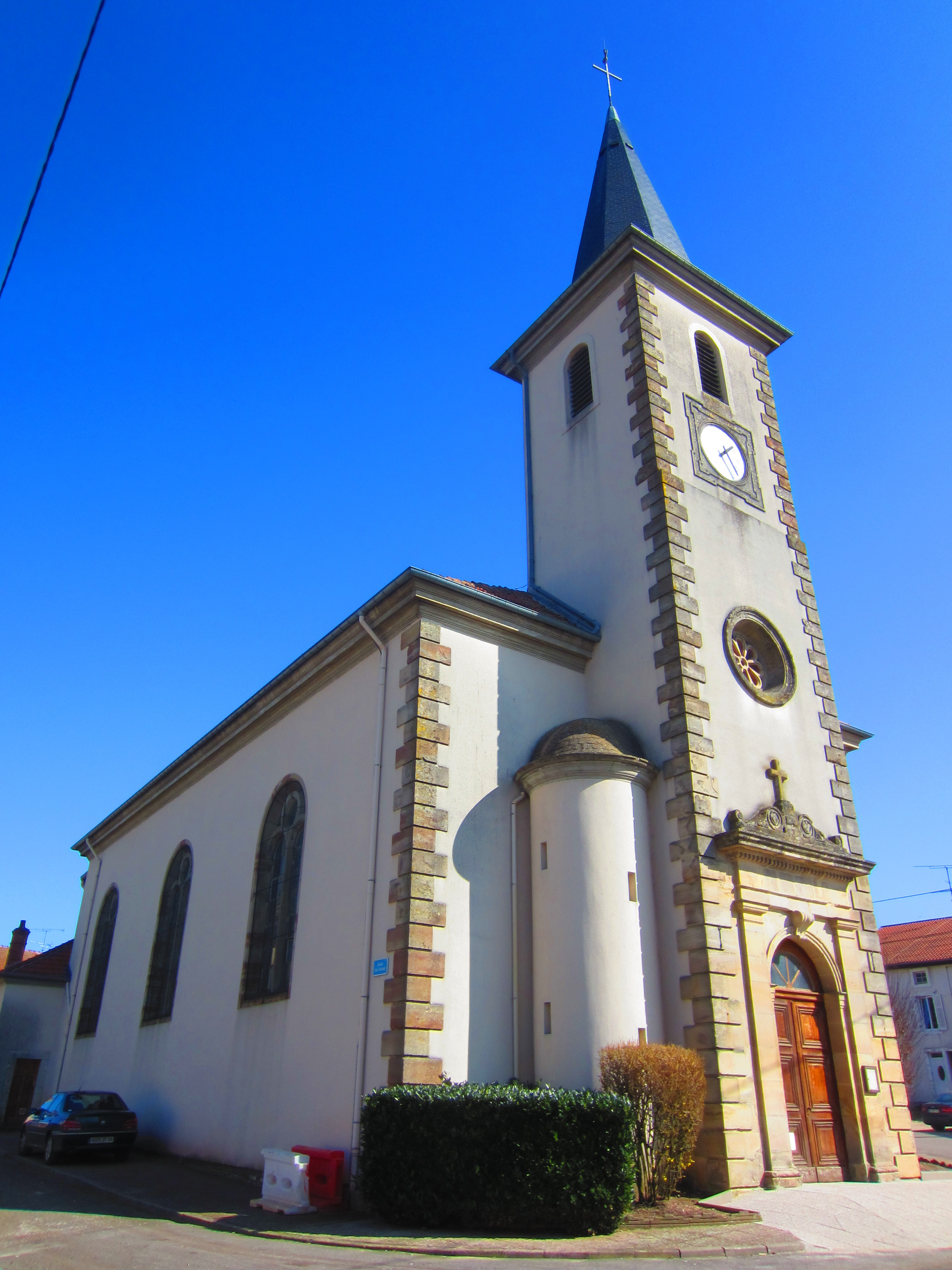 Rehainviller eglise